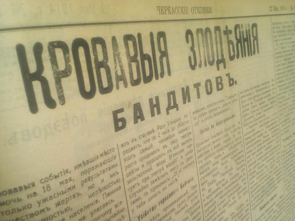 Стаття в газеті "Черкасски отклики" про вбивство 1914 року 5 осіб